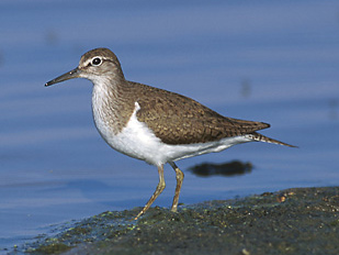 Actitis hypoleucos (Linnaeus 1758)